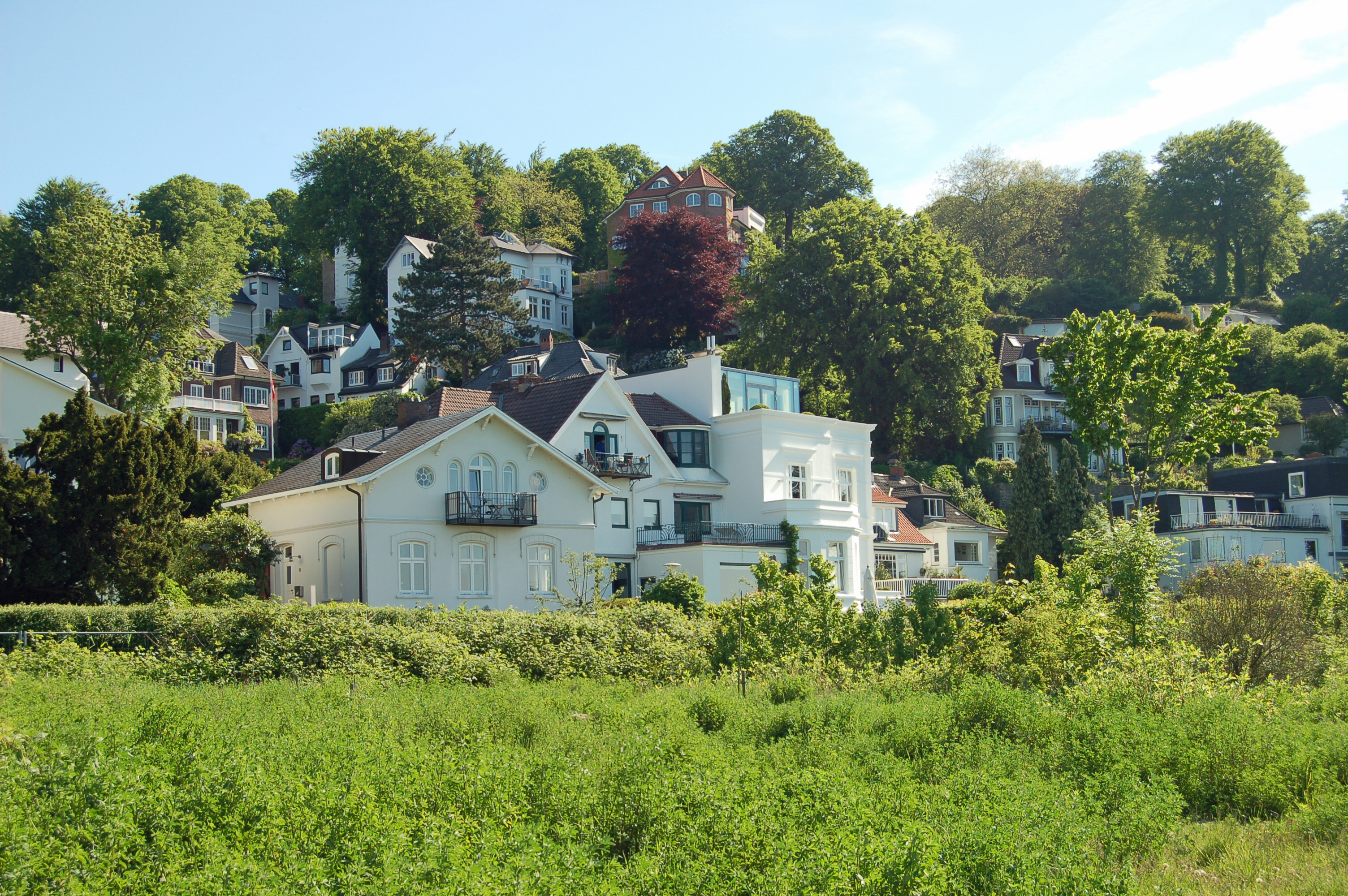 Die Elbvillen an der Elbe in Hamburg